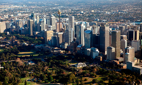 Sydney CBD on a sunny day